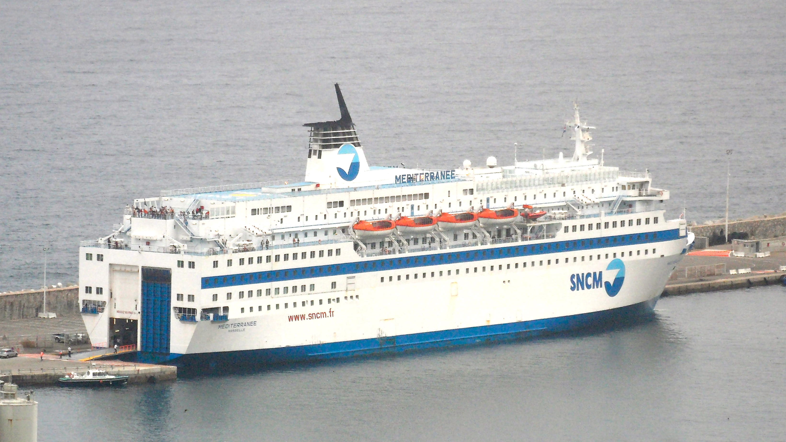 le Méditerranée de la SNCM à Bastia